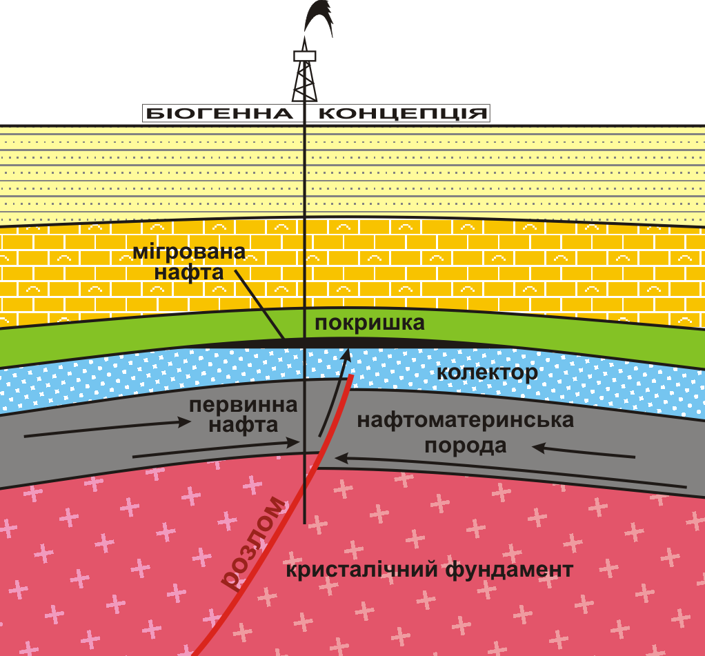 Схема біогенної концепції походження нафти і газу